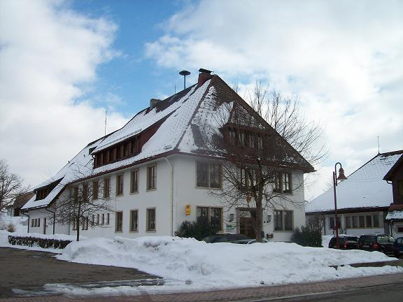 Rathaus Häusern